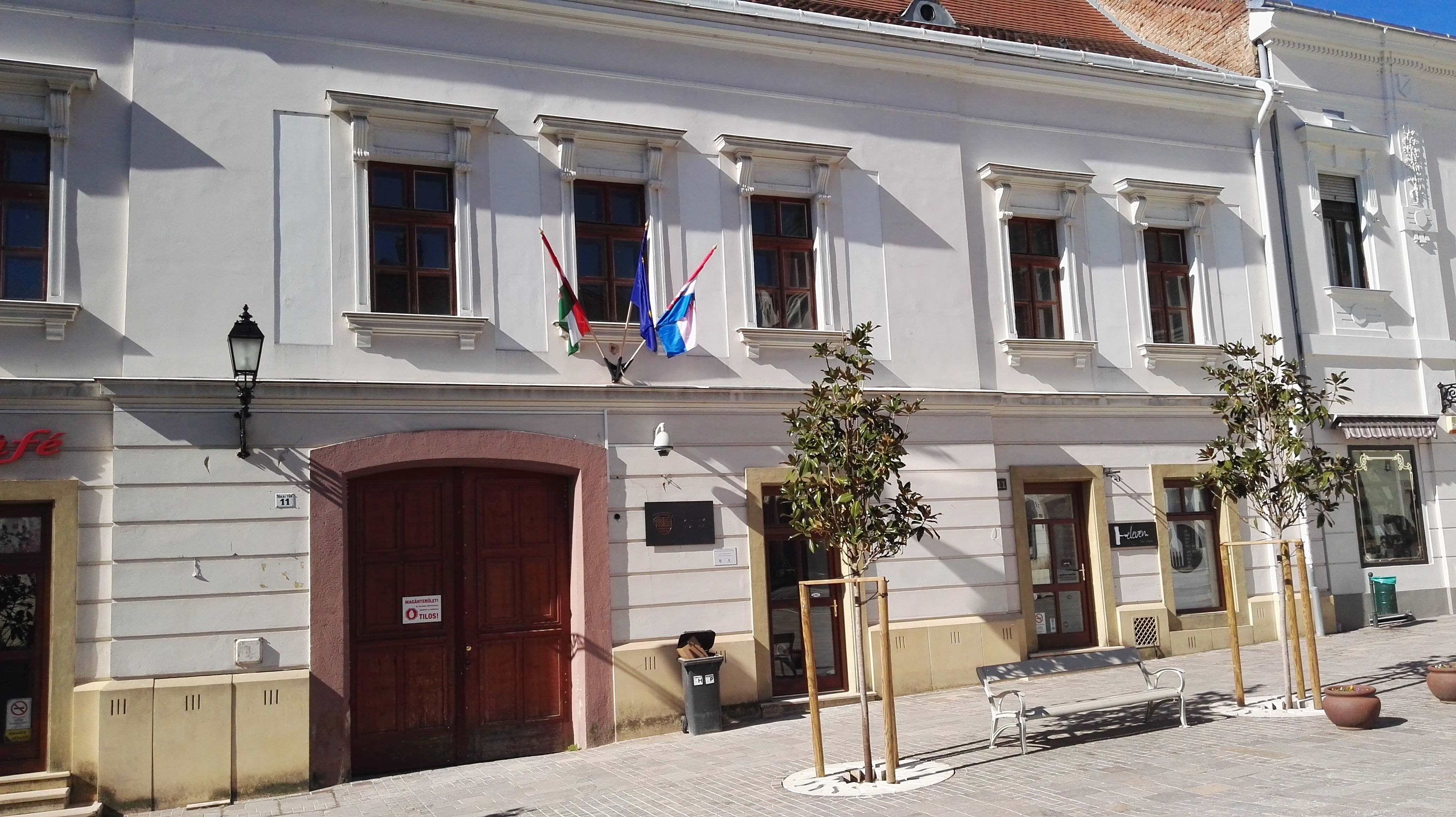 Horvát ház Pécsett a Jókai tér 11. szám alatt Srpskohrvatski / српскохрватски: hrvatski dom u Pečuhu. Adresa: Pécs, Jókai tér 11.